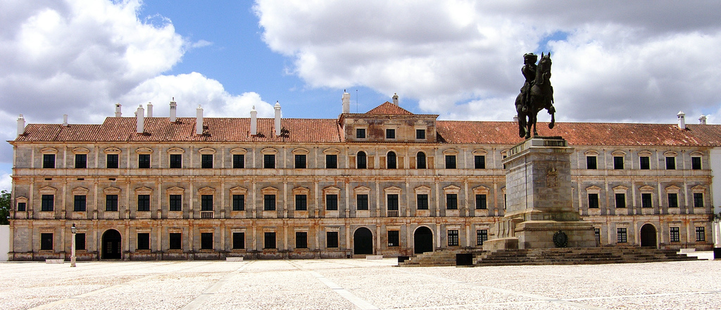 Ducal Palace of Vila Viçosa, Portugal